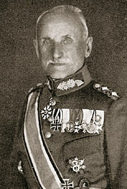 Maximilian von Speidel (1856-1943), Bay. General und Minister